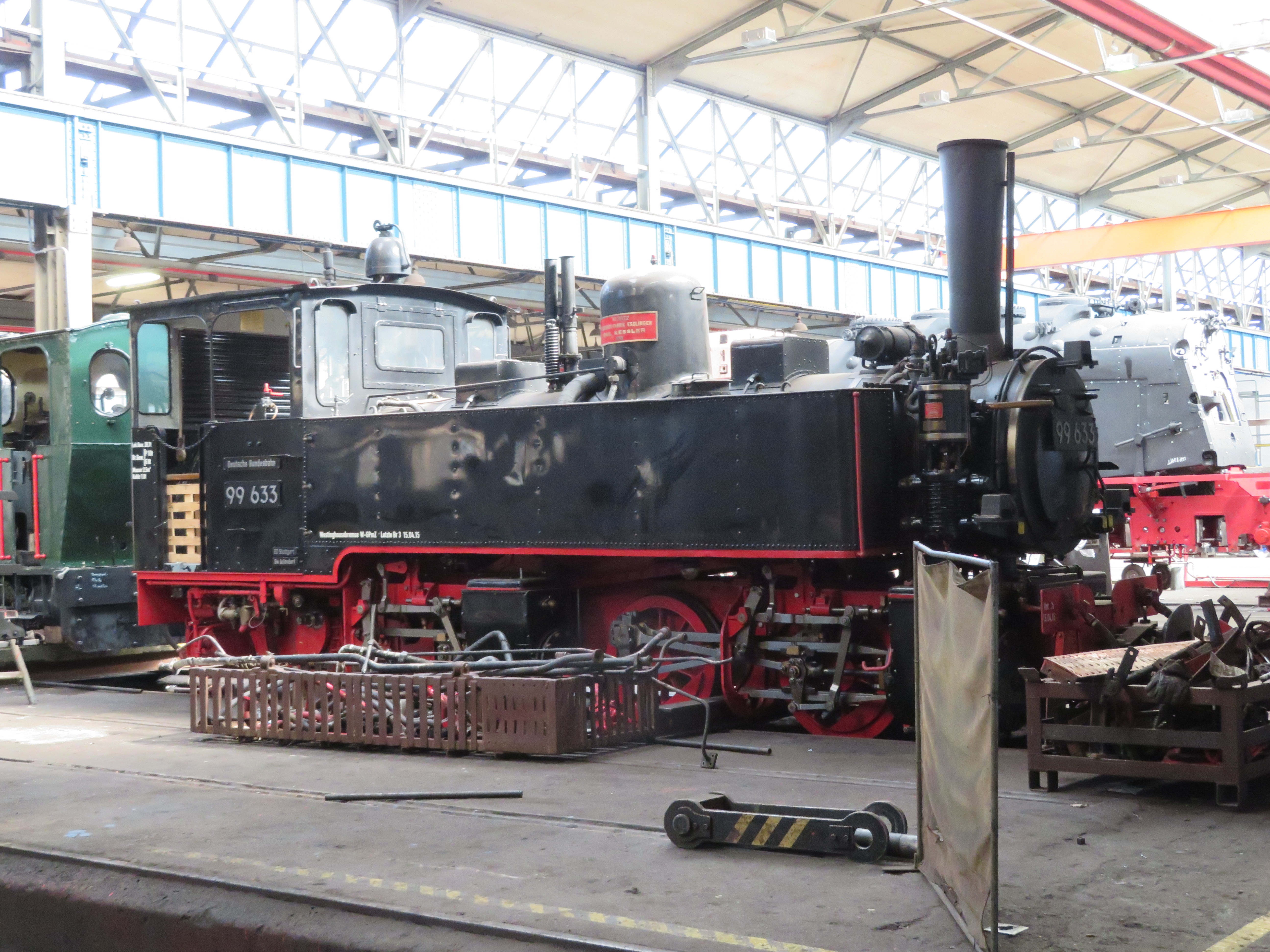 im Meininger Dampflokwerk